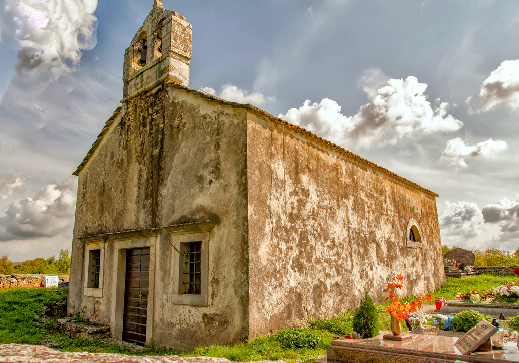 Crkva Sv Margarete u Juralu na groblju